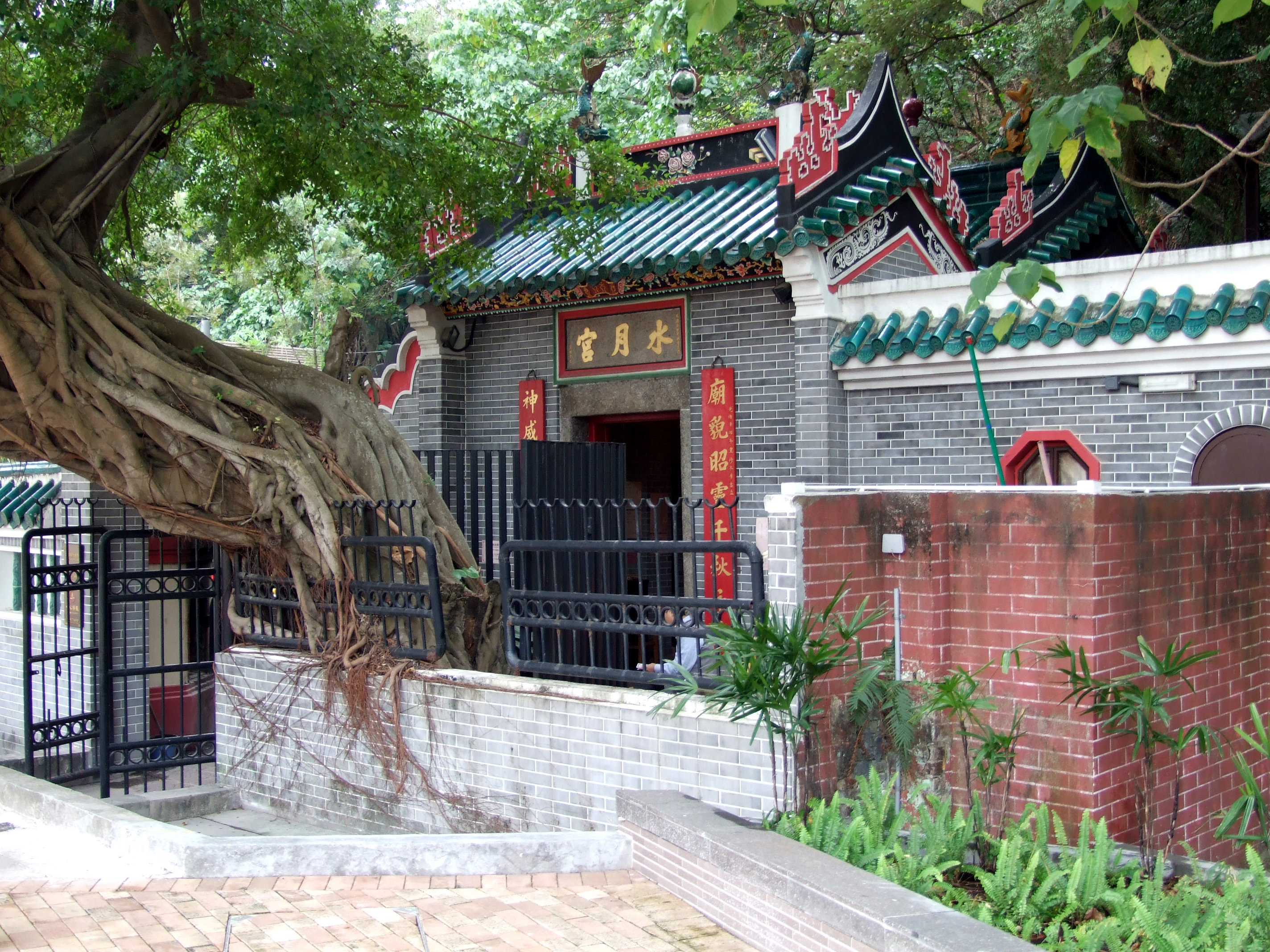 中文（香港）: 鴨脷洲水月宮 Shui Yuet Temple